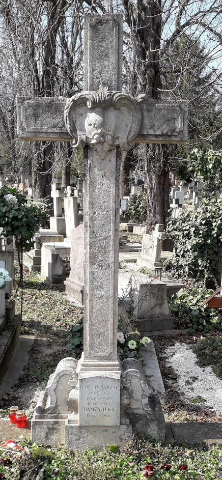 Plósz Sándor jogtudós síremléke a [farkasréti temető]ben 1/6. (1/C.) parcella 1-43/44 sírhely. Feleségével Hamza Ilkával közös sírhely.